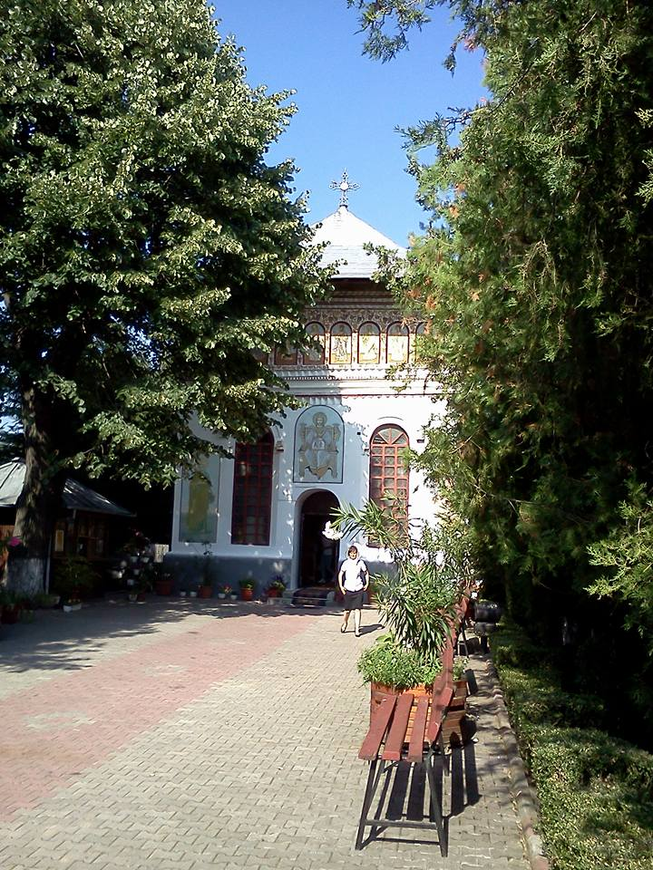 Biserica „Sf. Apostoli Petru și Pavel”- Domnească